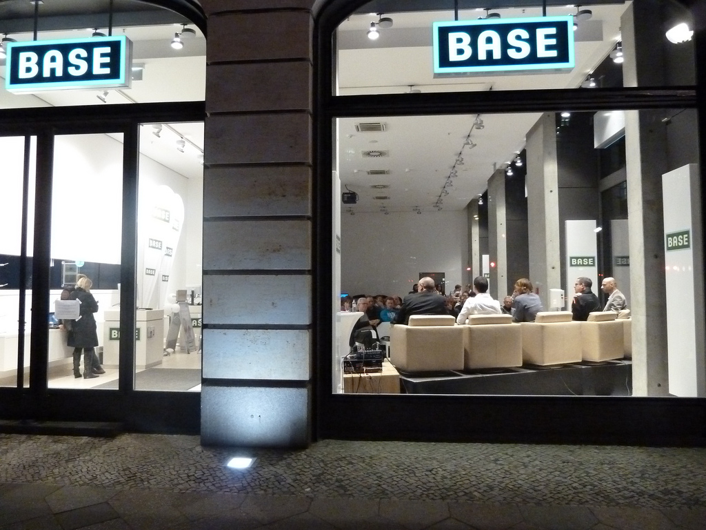 BASE-Camp Berlin